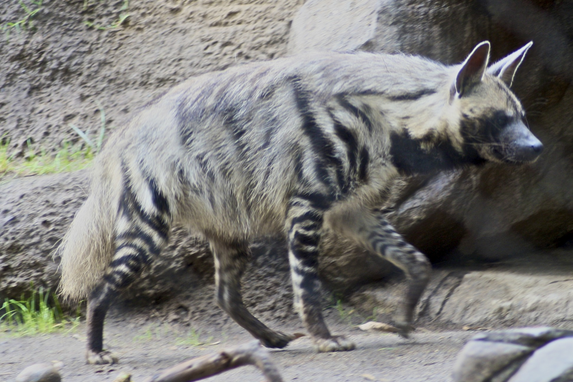 Striped Hyena (Hyaena hyaena)